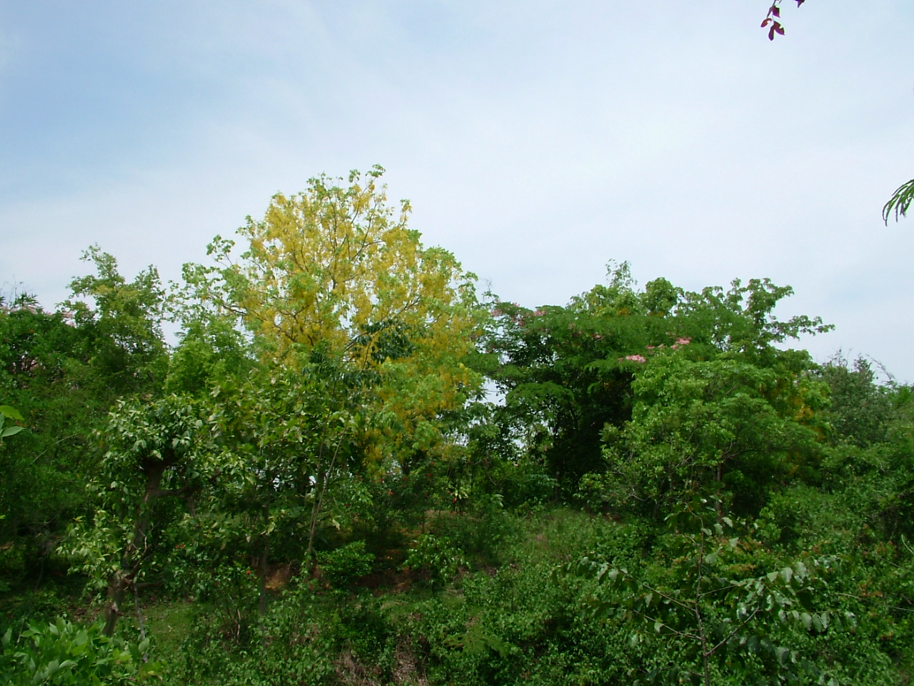 Muồng hoàng yến (Cassia Fistula L) họ Đậu (Fabaceae) trong rừng Trohbư